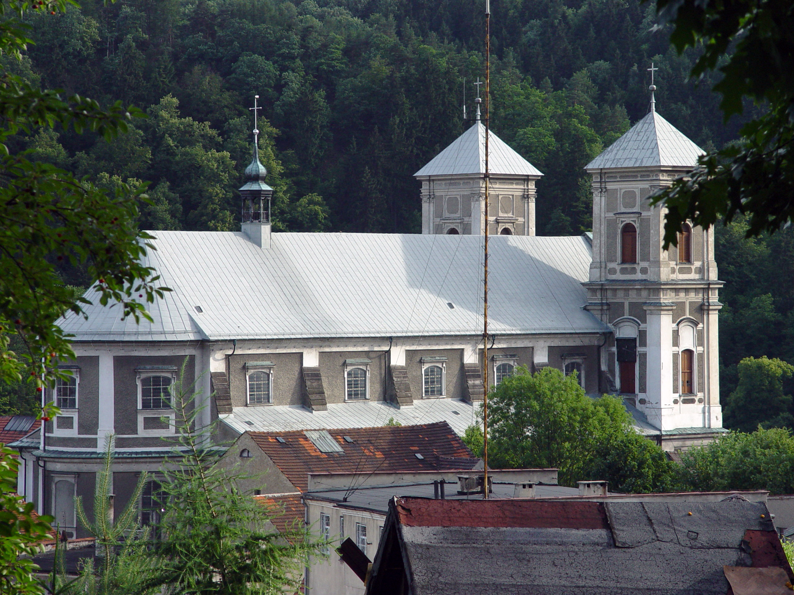 Bardo (woj. dolnośląskie) - widok na kościół